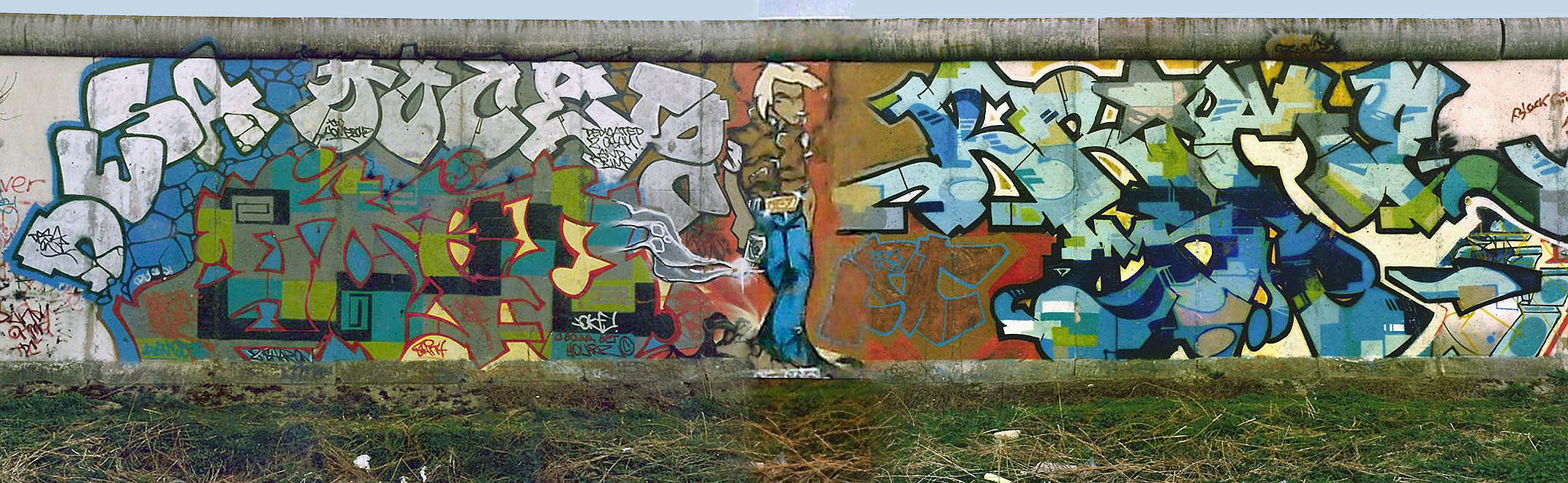 Berlin Wall denots crew Graffiti